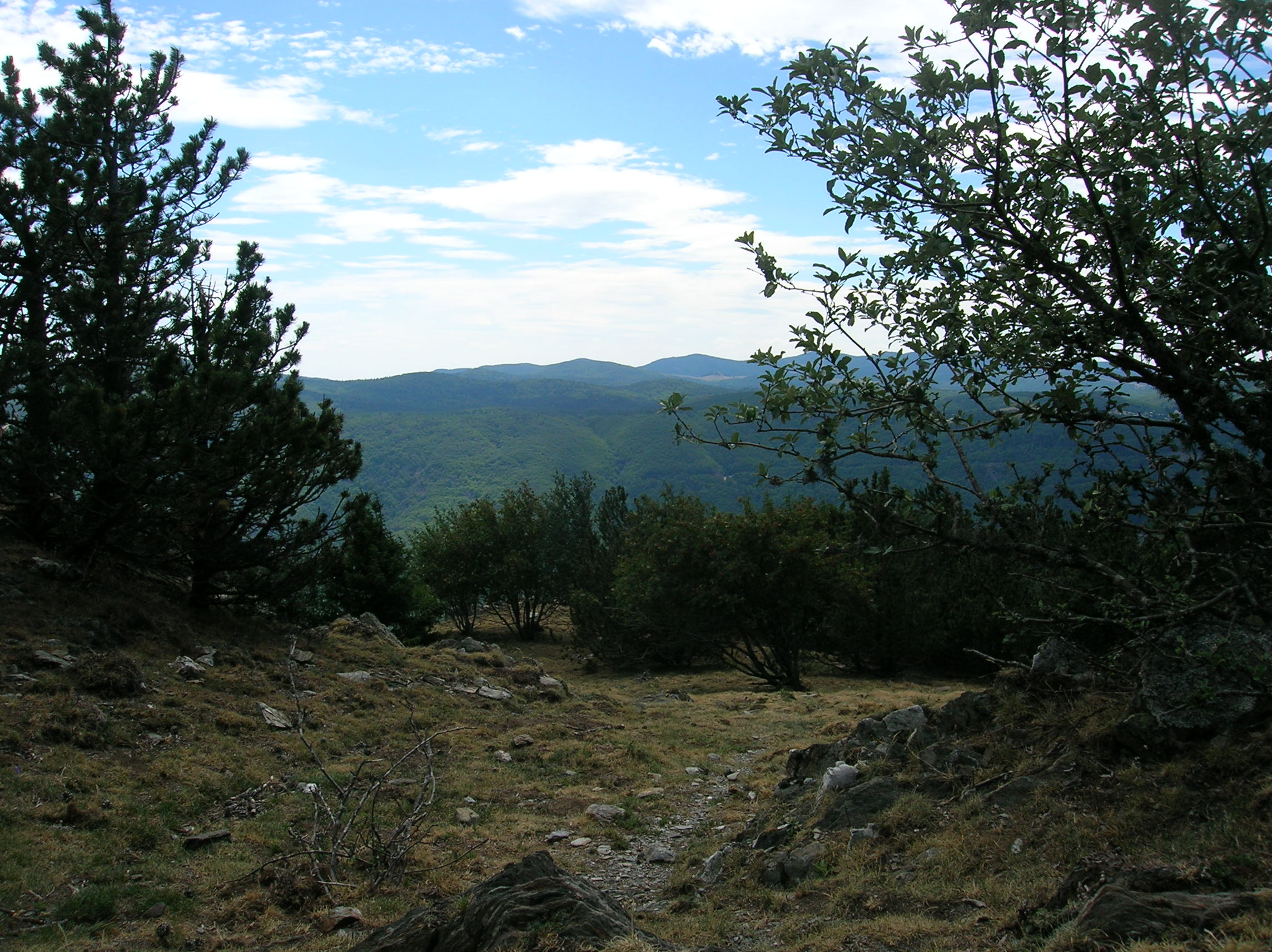 Photo prise dans les Cévennes au Mont Aigoual